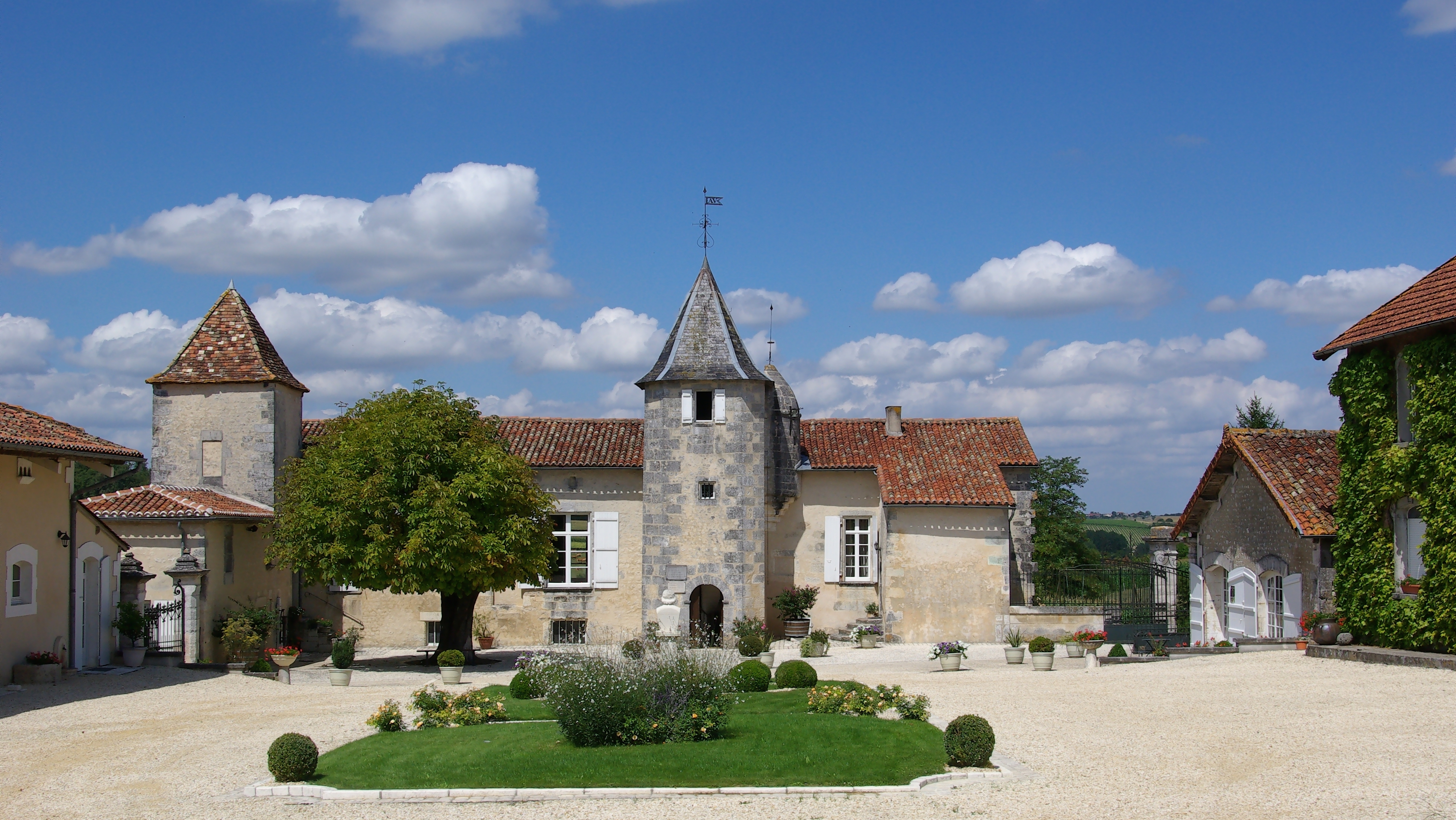 Logis du Maine-Giraud, ancienne propriété de la famille d'Alfred de Vigny, Champagne-Vigny, Charente. Le domaine appartient actuellement à la famille Durand qui l'entretient et permet les visites. .